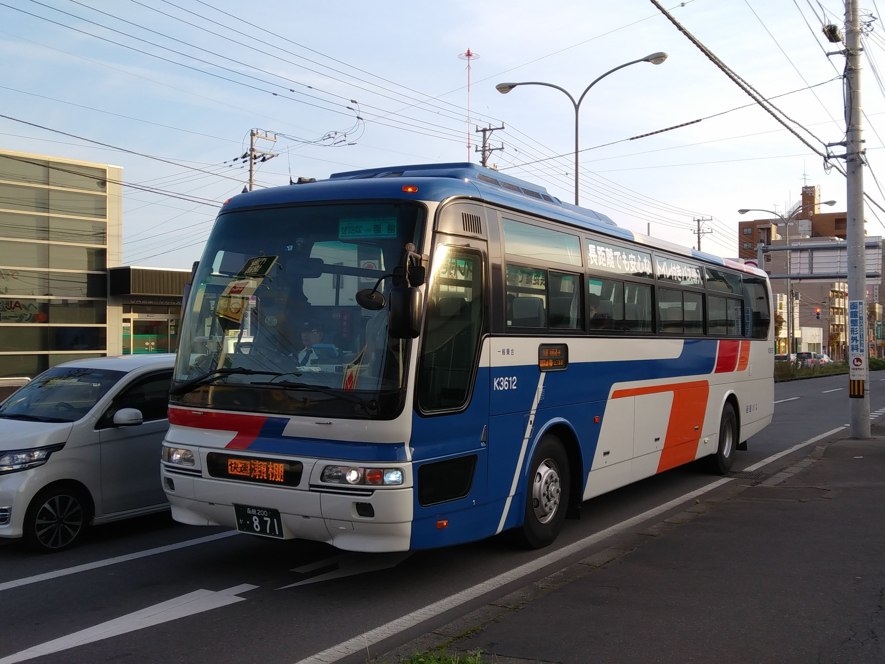 函館・瀬棚線（快速瀬棚号）・函館バス初のトイレ付き路線バス（K3612）